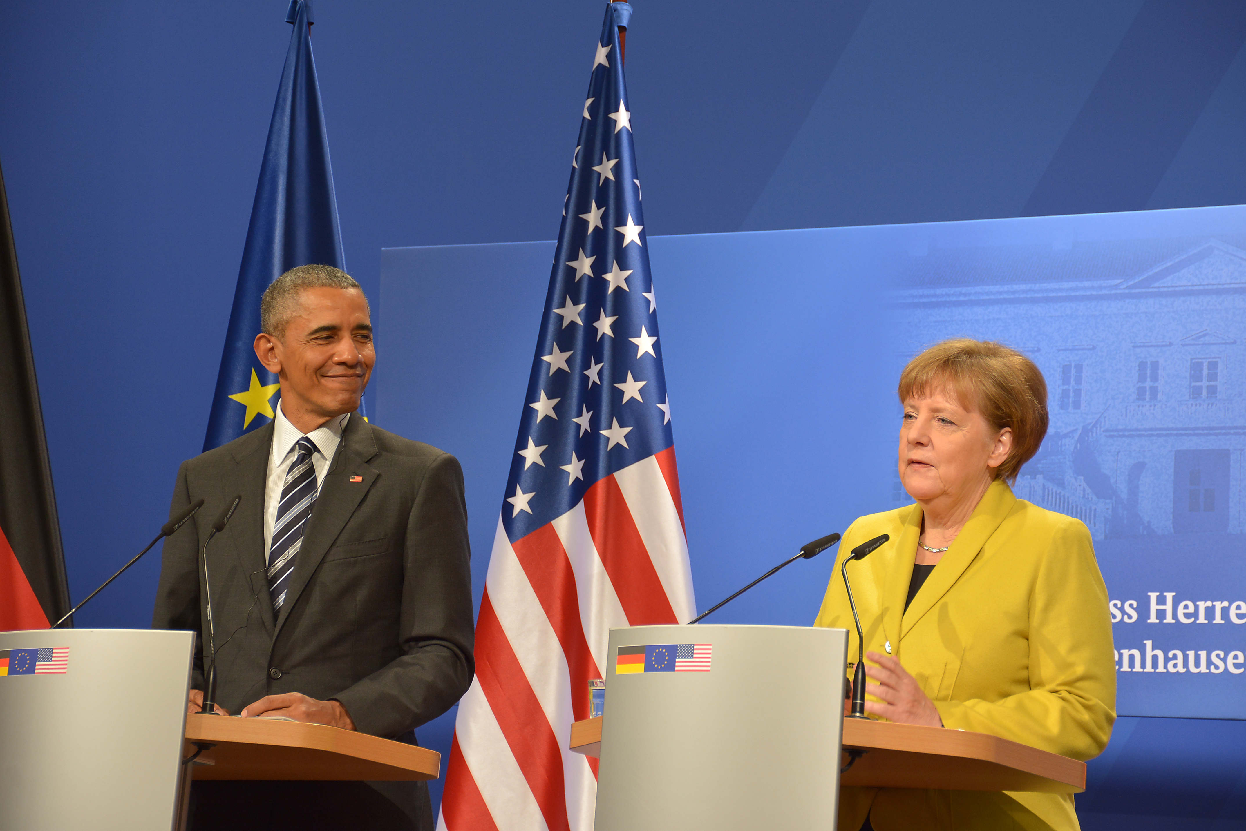 Pressekonferenz von Bundeskanzlerin Merkel und US-Präsident Obama am ersten Besuchstag, 24.04.2016, im Schloss Herrenhausen in Hannover.